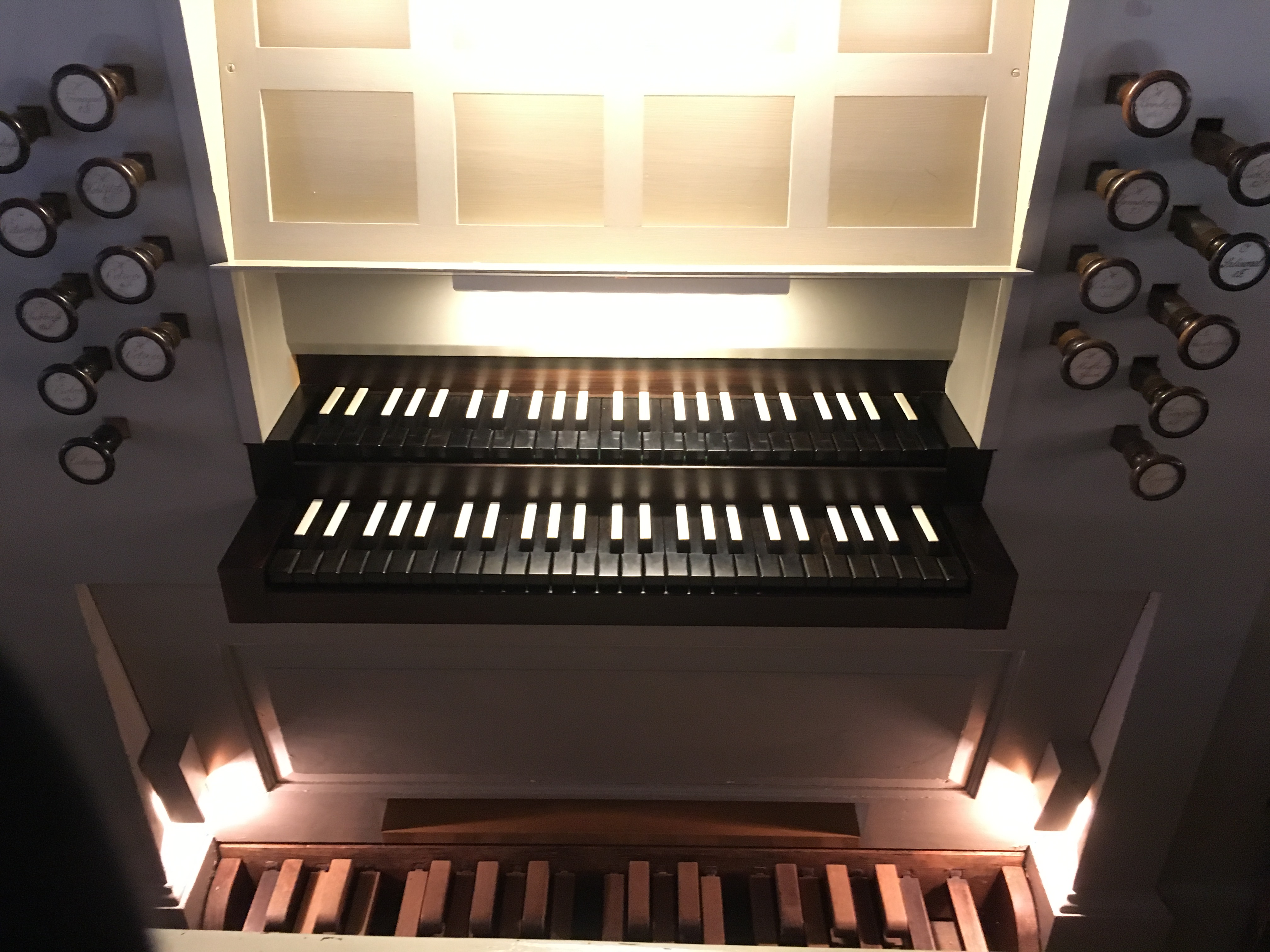 Der Spieltisch der Orgel mit beiden Manualen und den Registerzügen mit den handgeschriebenen Registernamen.